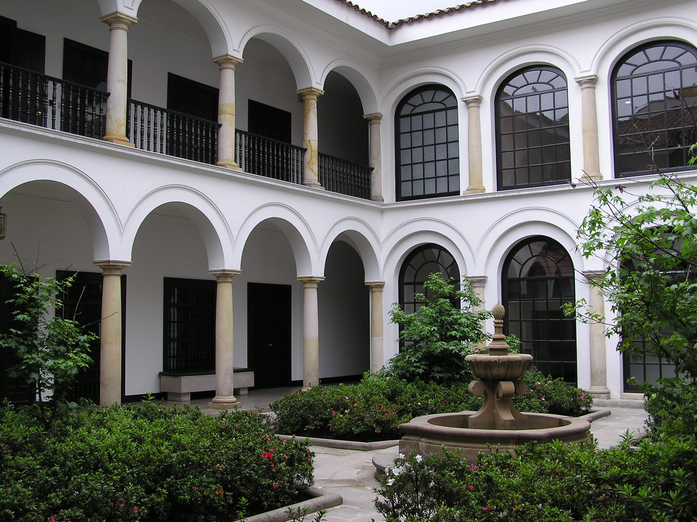 Museo, Casa de la Moneda Bogota